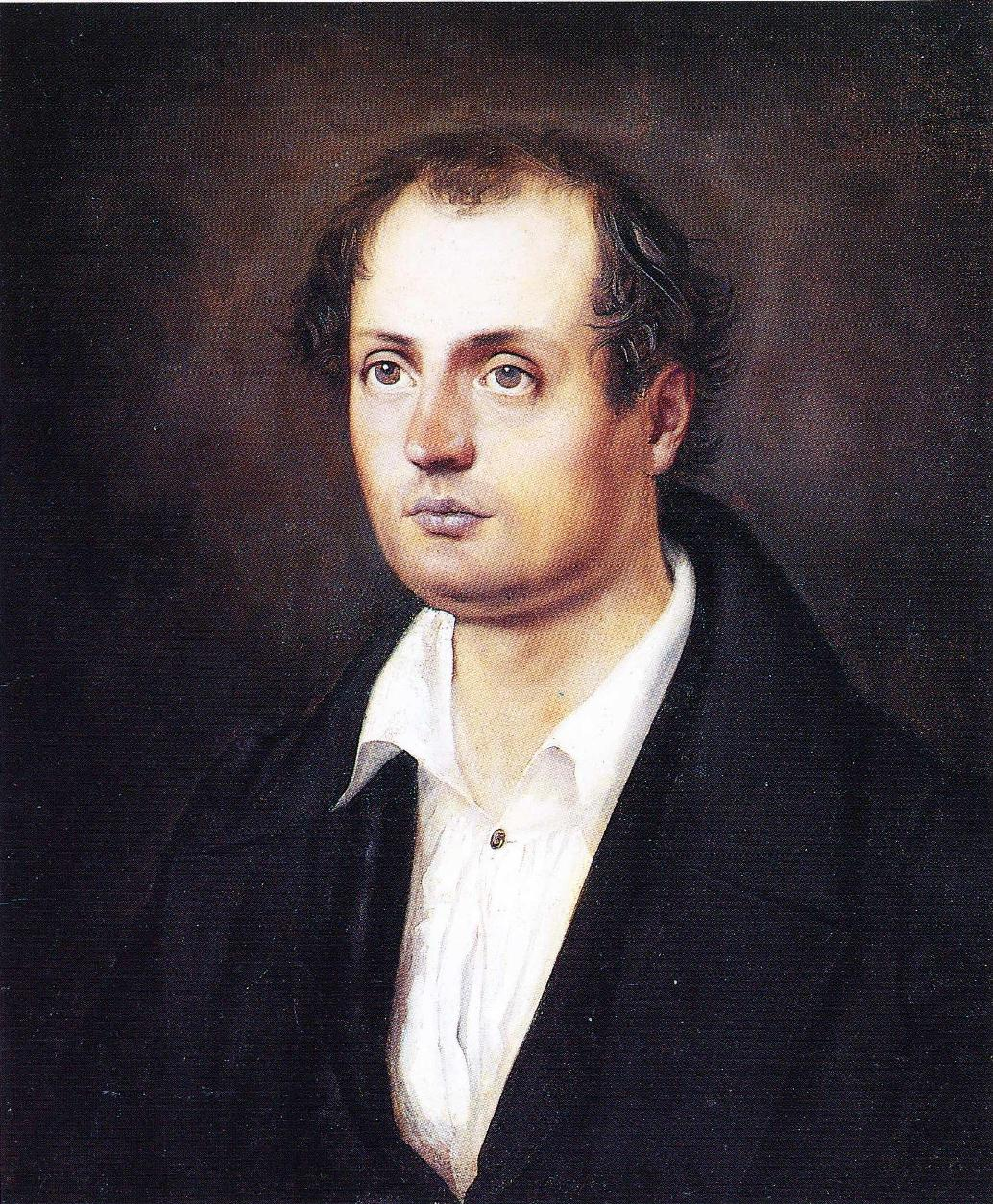 Nuori J. L. Runeberg, Helsingin yliopiston Pohjalaisen Osakunnan tilaama muotokuva vuodelta 1837. Muotokuvan omistaa yliopiston Pohjalainen valtuuskunta.